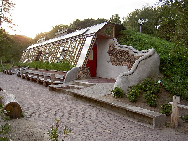 Earth ship in Zwolle (NL)